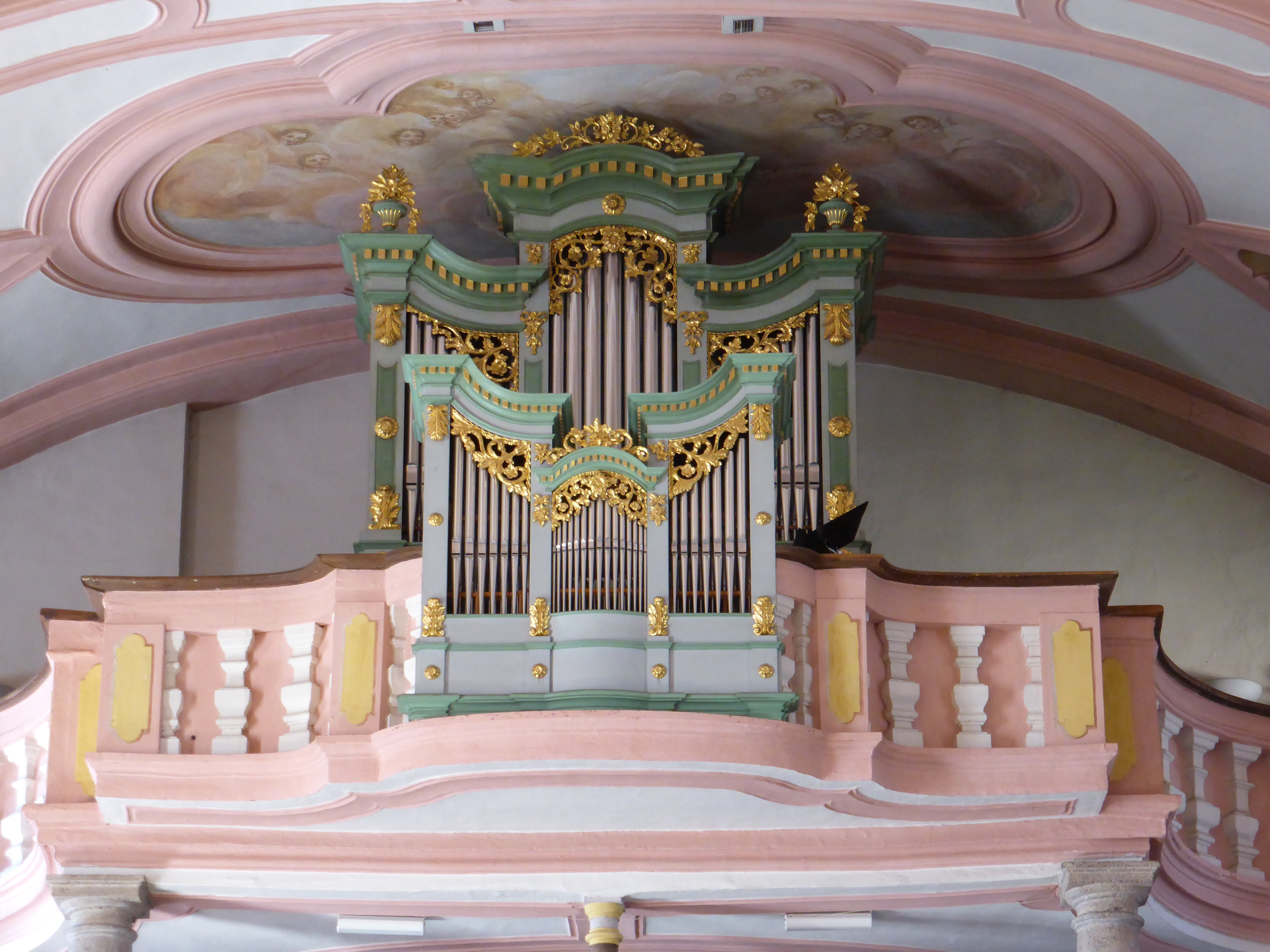 Vorchdorf Orgel mit neuem Brüstungspositiv